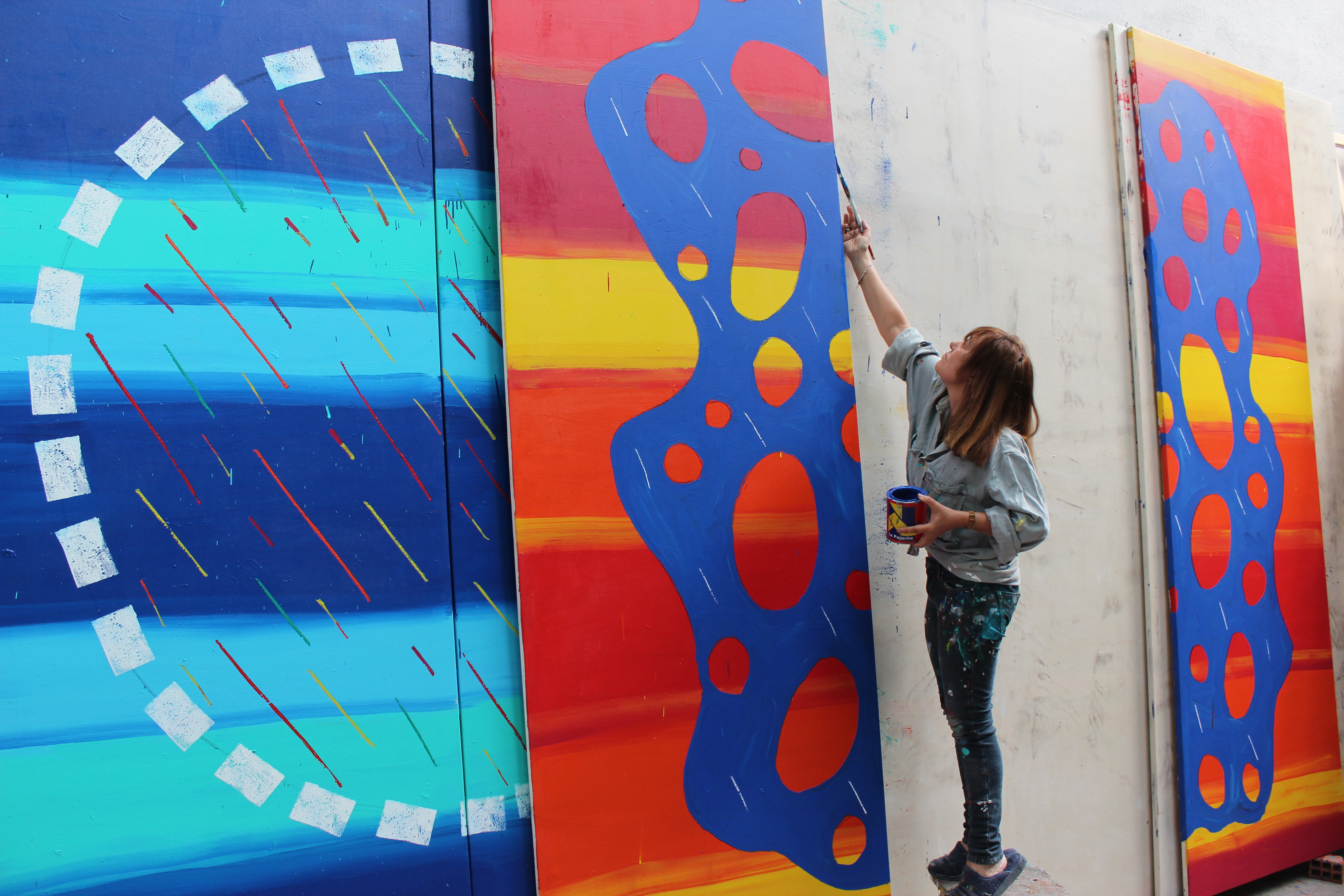 Menchu Lamas, trabajando en el estudio